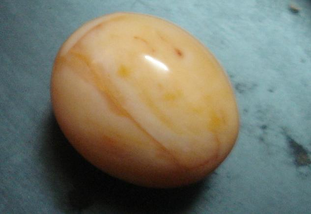 Ngộc ốc giác, chụp tại Phú Quốc